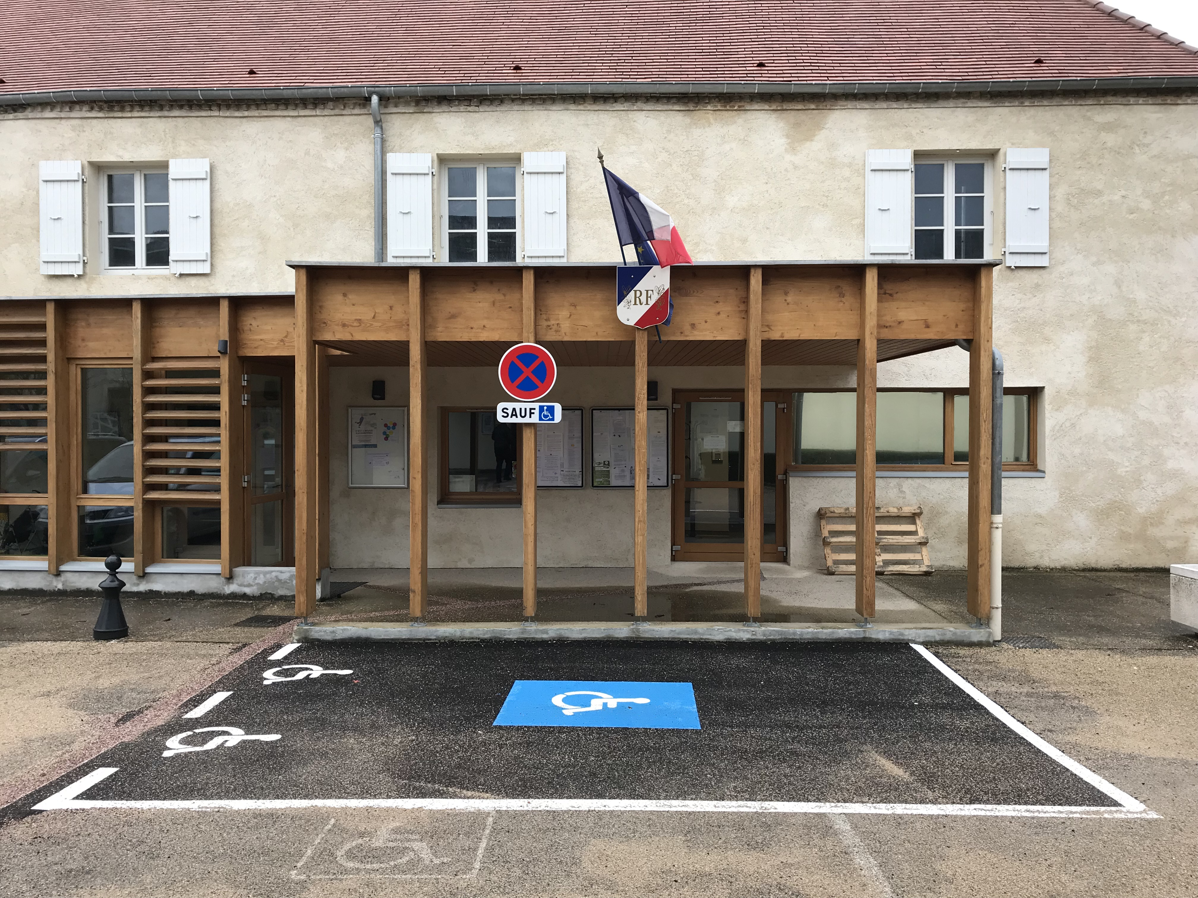 Image de La Loye (Jura) en janvier 2018.